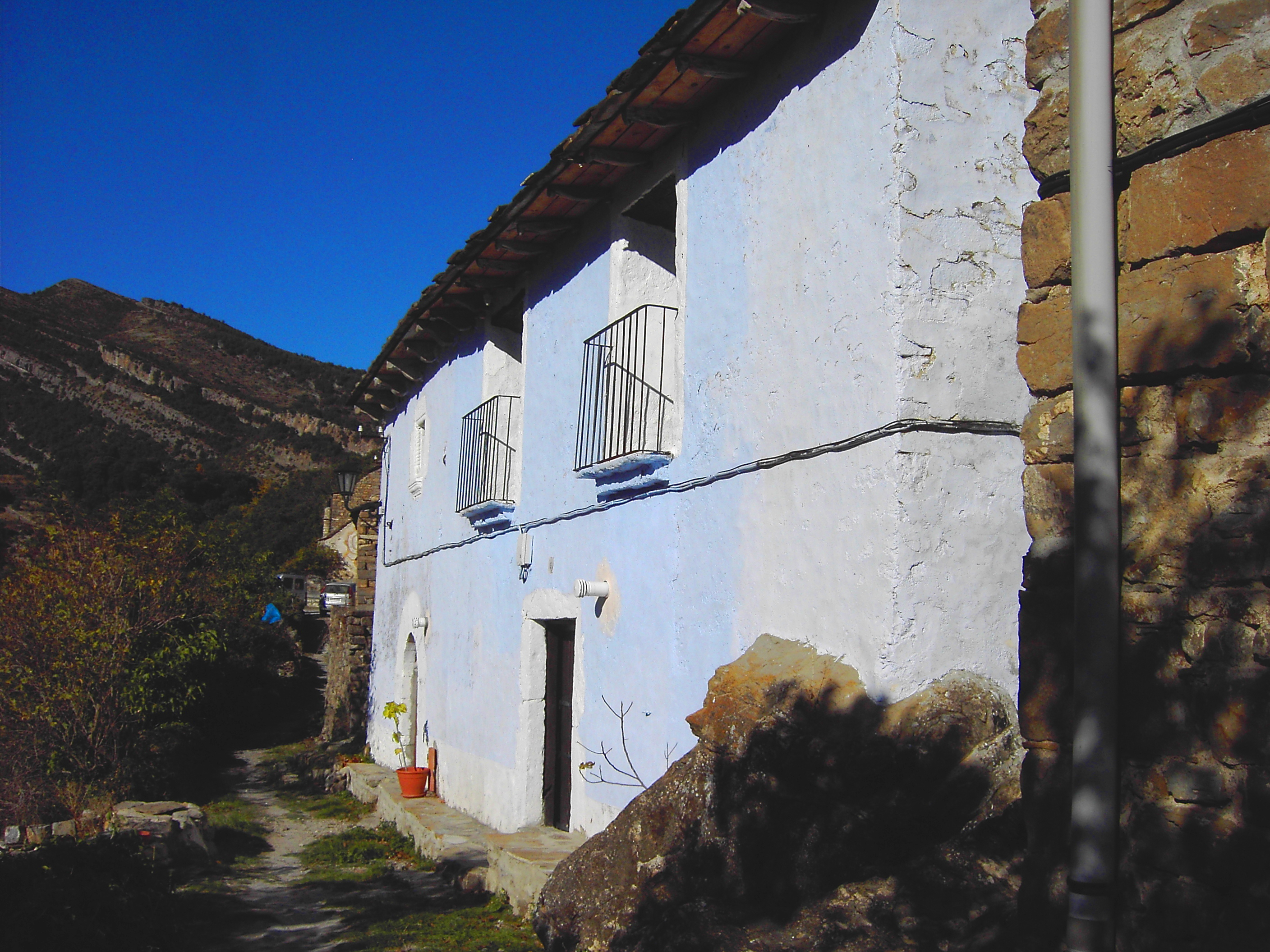 Una casa de fachada clara en Ascaso.